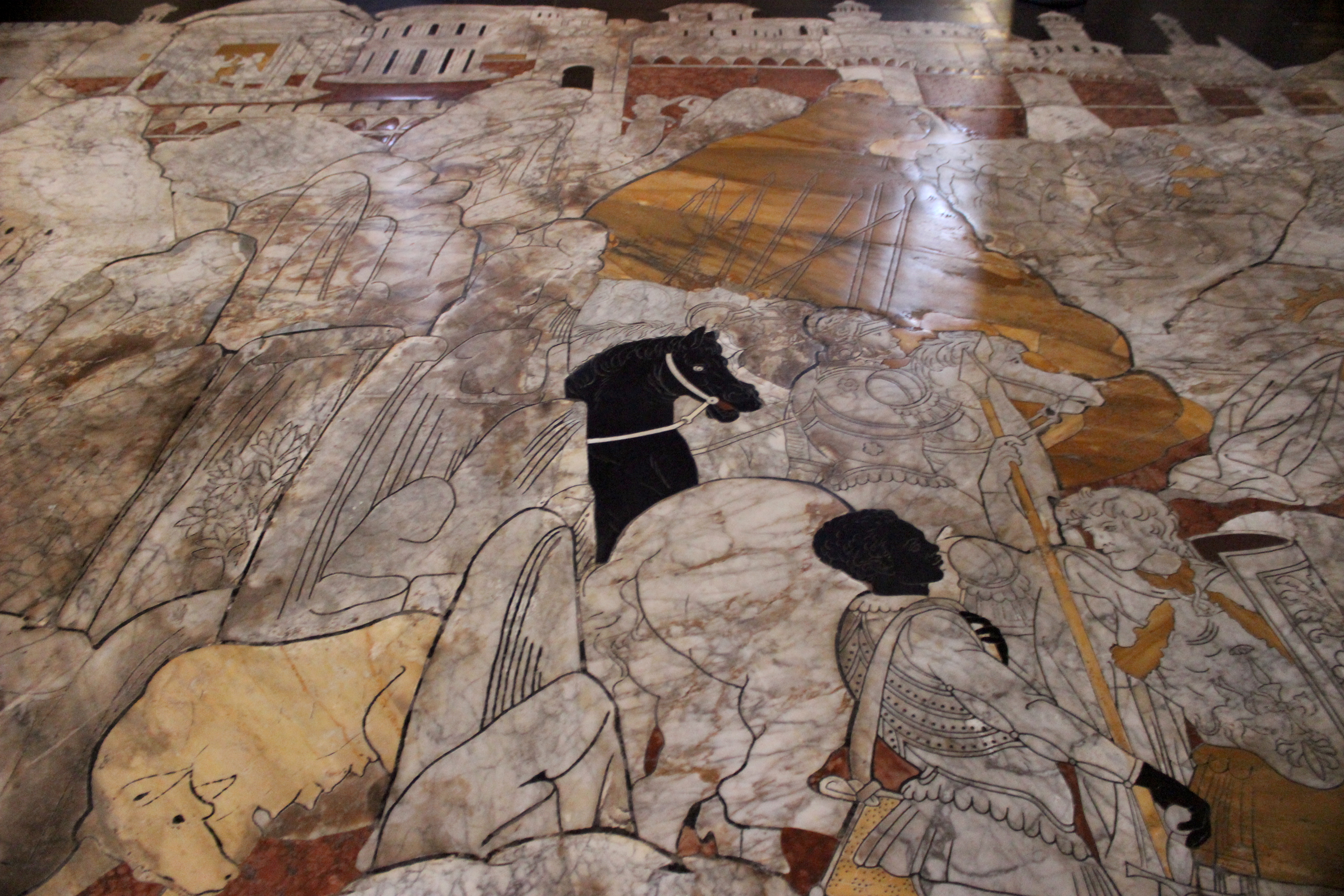 Pavimento de la catedral de Siena. Historia de Jefté.